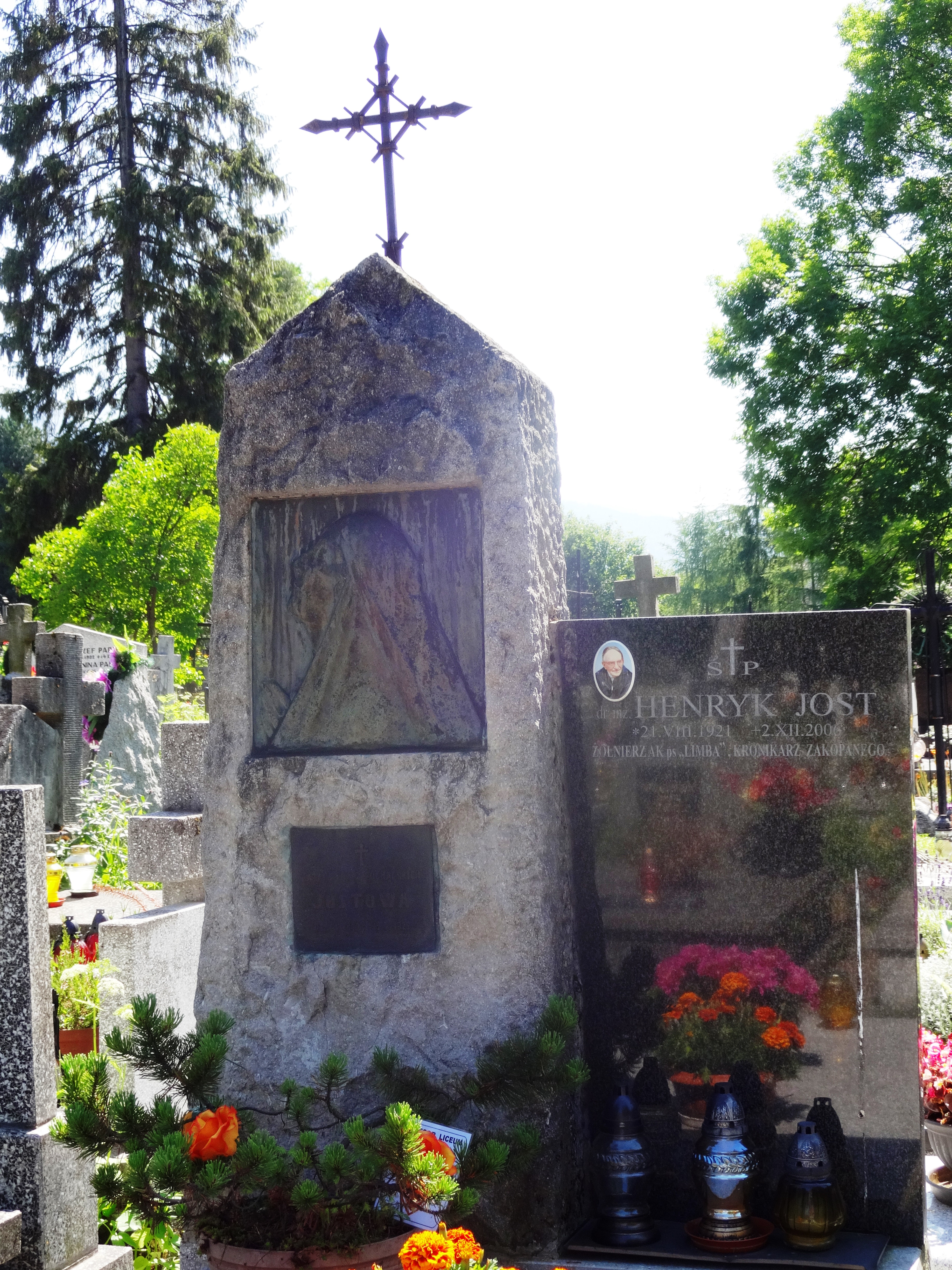 New Cemetery in Zakopane